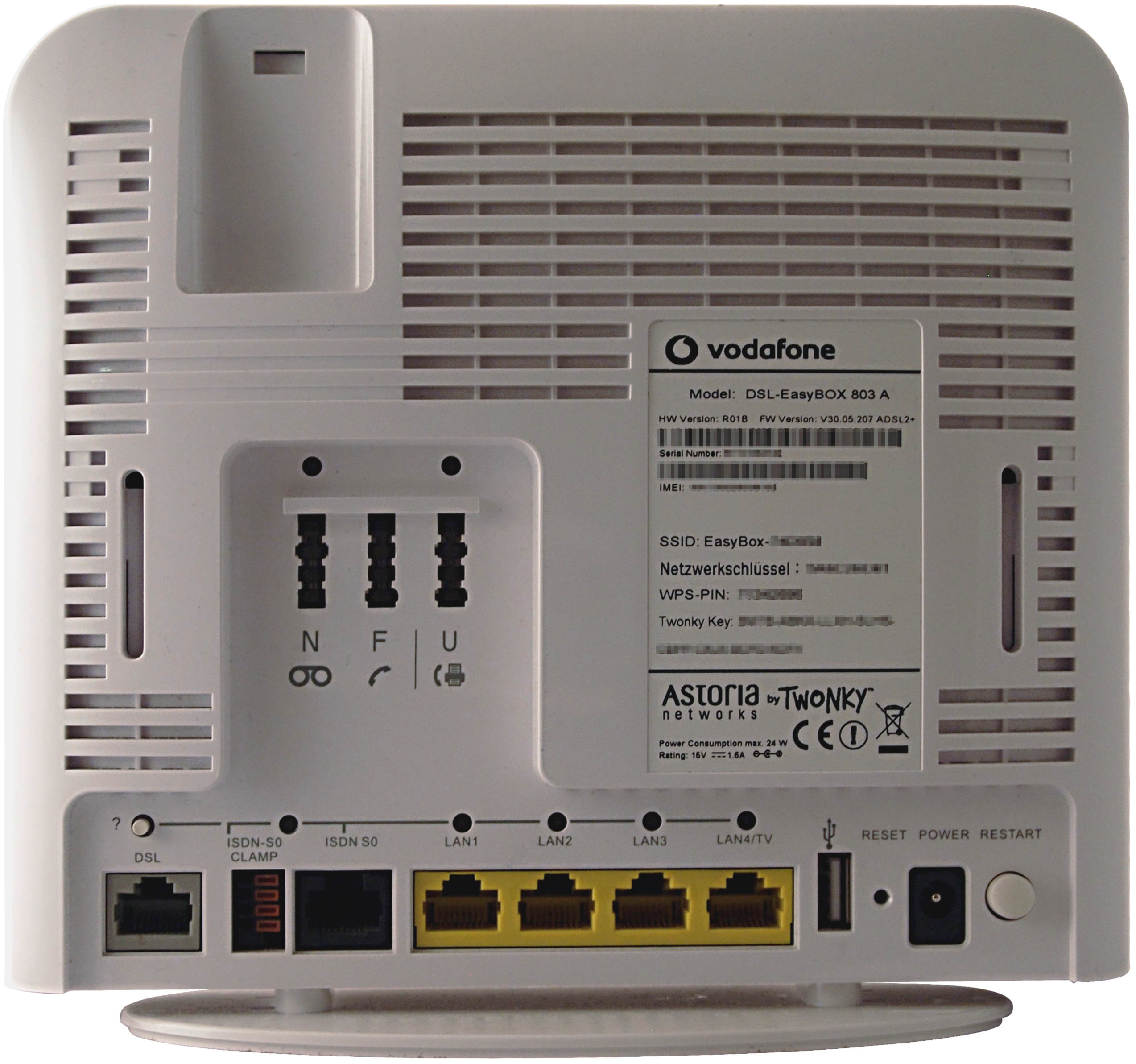 Rückseite des DSL-Routers Easybox 803A (Vodafone) - Astoria Twonky. The device is owned by Ordercrazy and technically no longer in use - there is no need to obfuscate MAC-Adress, WPS-Key etc.